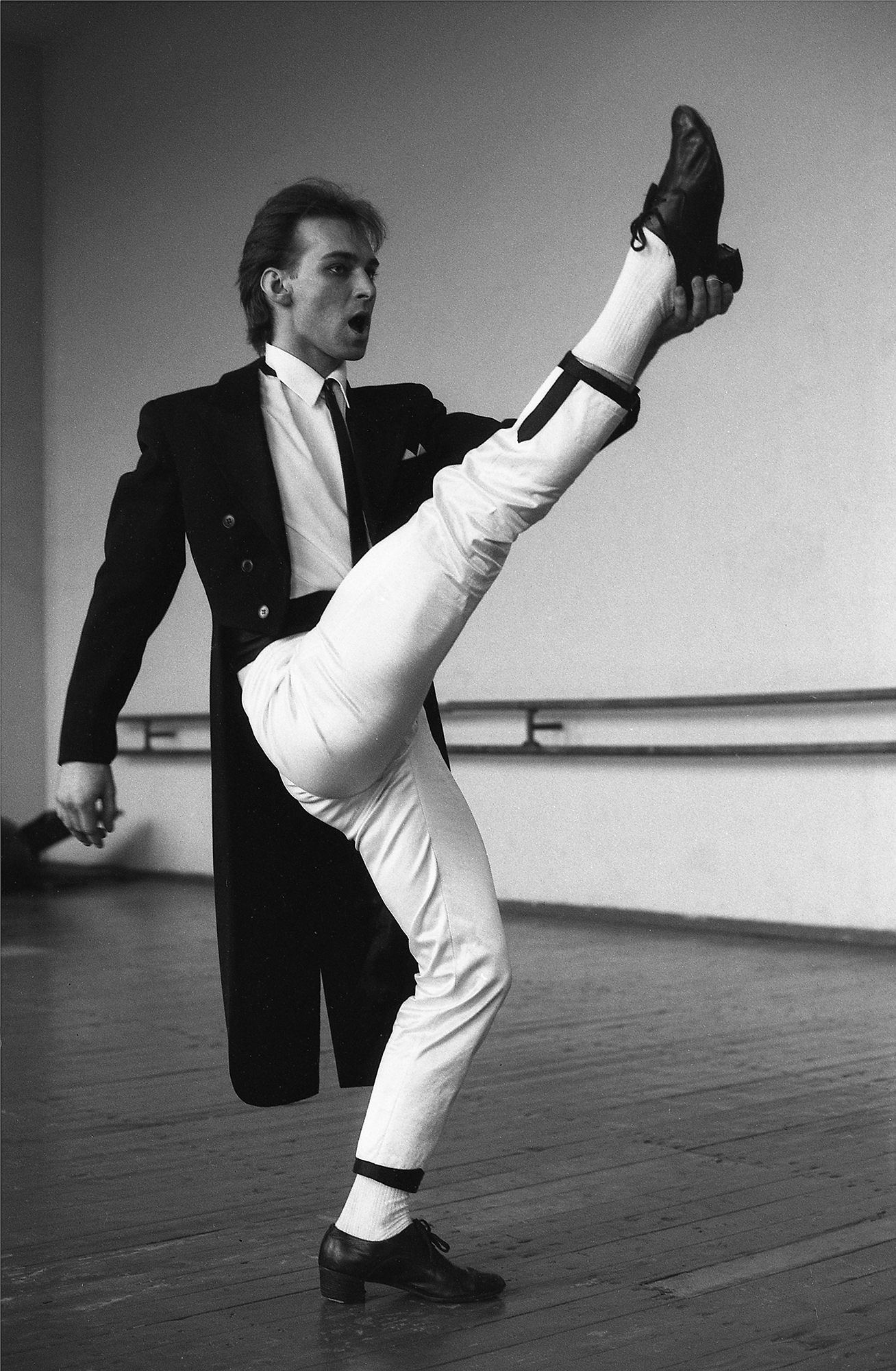 Renee Nõmmik, tantsupedagoog 1989